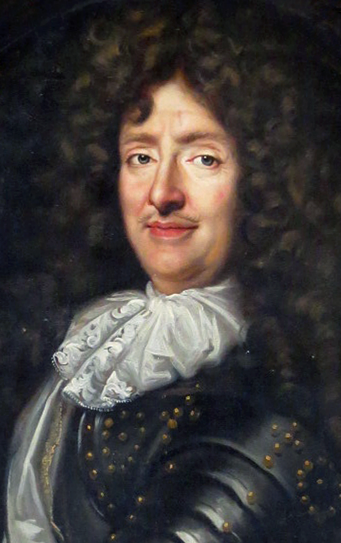 Château de Bussy-Rabutin, portrait de Roger de Rabutin de Bussy.